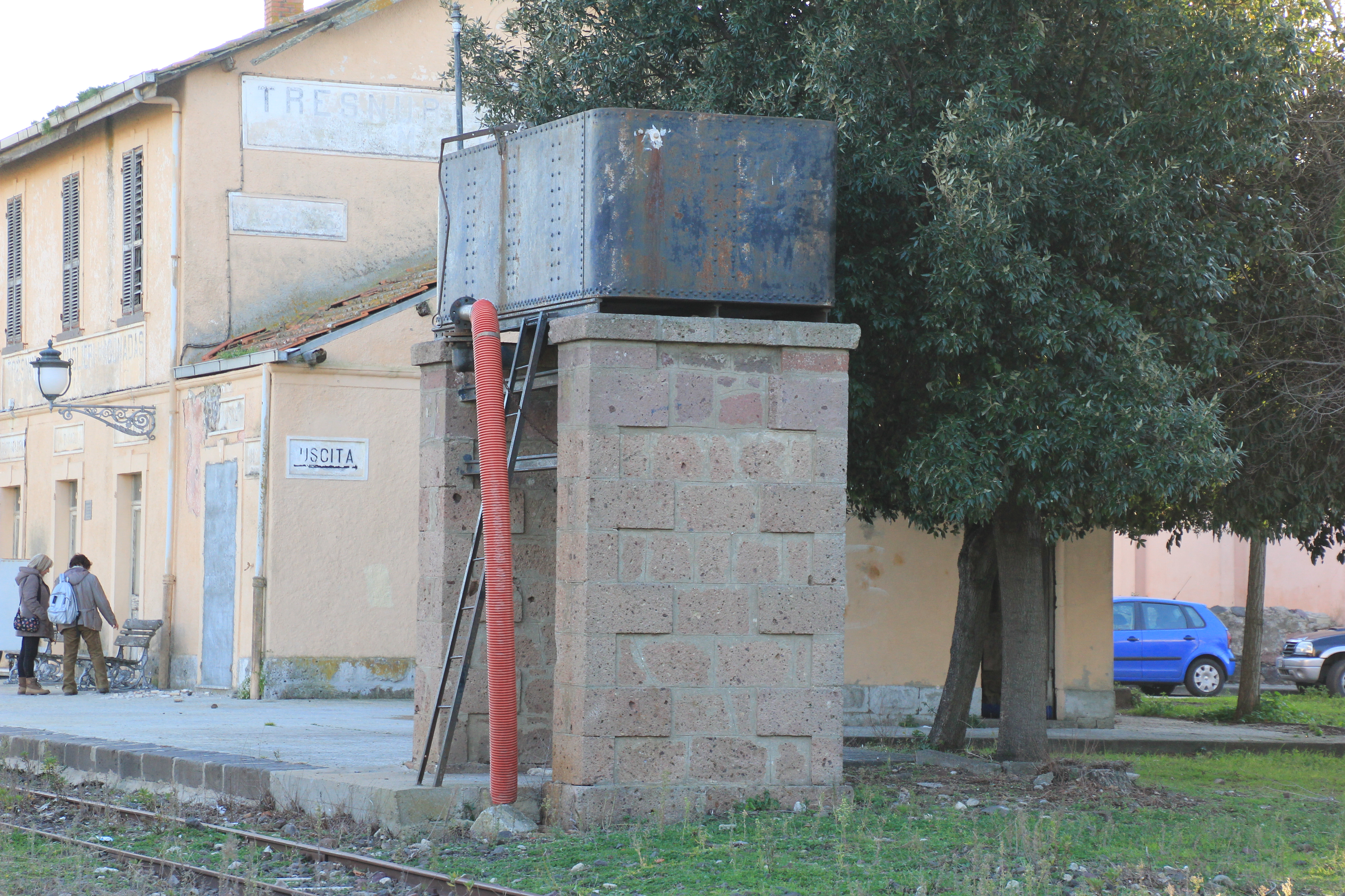 Tresnuraghes, stazione ferroviaria